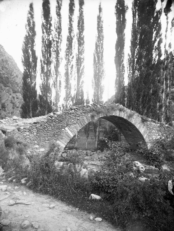 Imatge